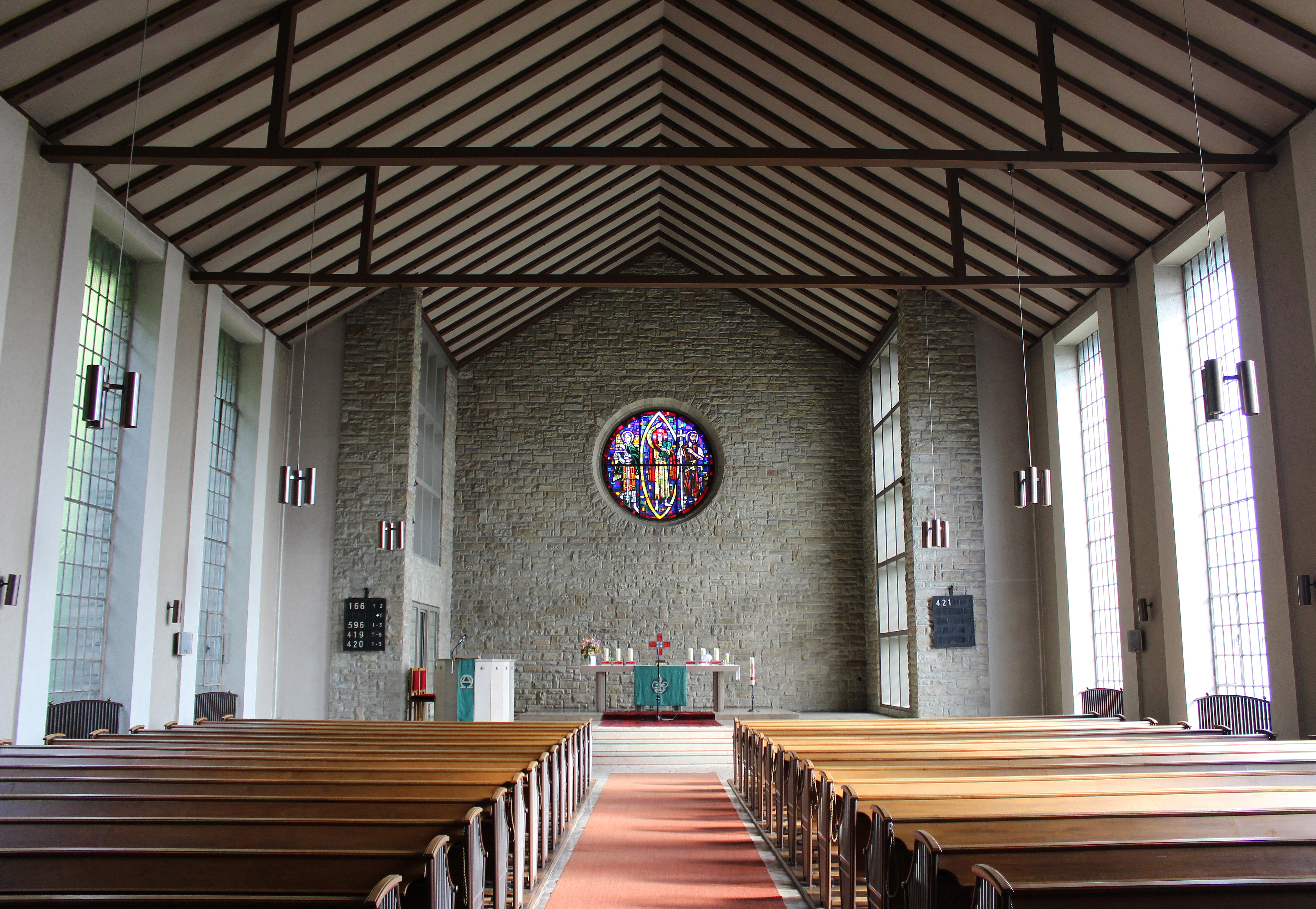 Blick ins Innere der evangelischen Auferstehungskirche in Wehrden, einem Stadtteil von Völklingen, Saarland